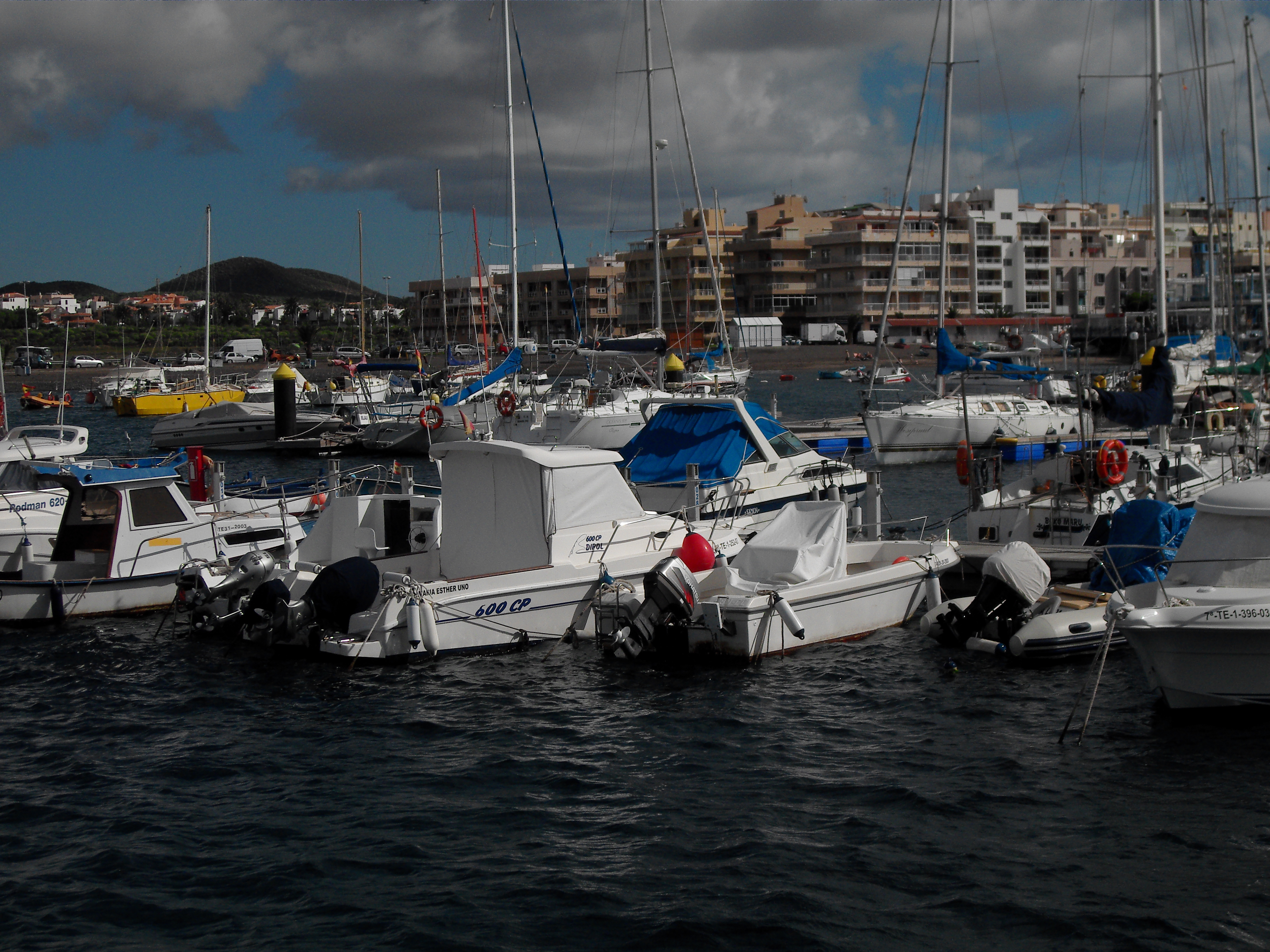 La localidad de Las Galletas desde el Puerto Deportivo Marina del Sur